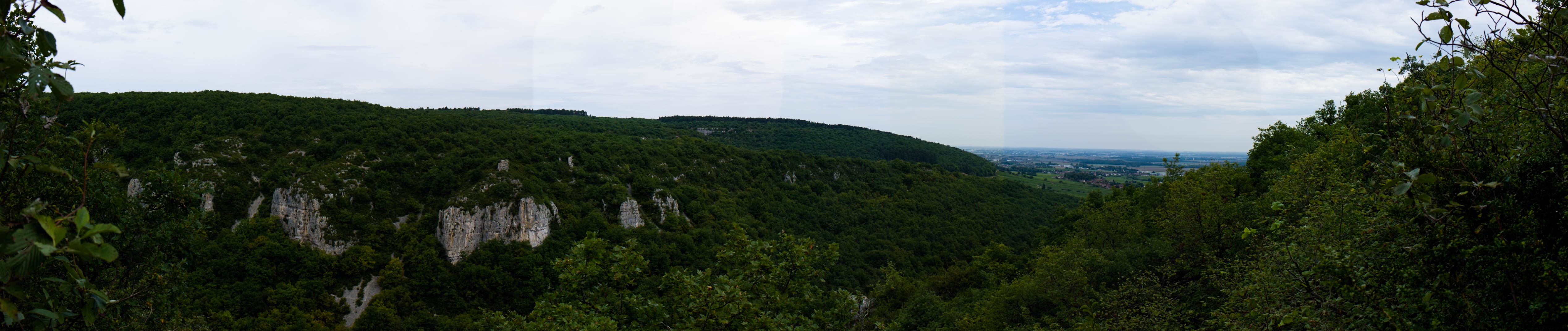 Combe Lavaux-Jean Roland - Panorama